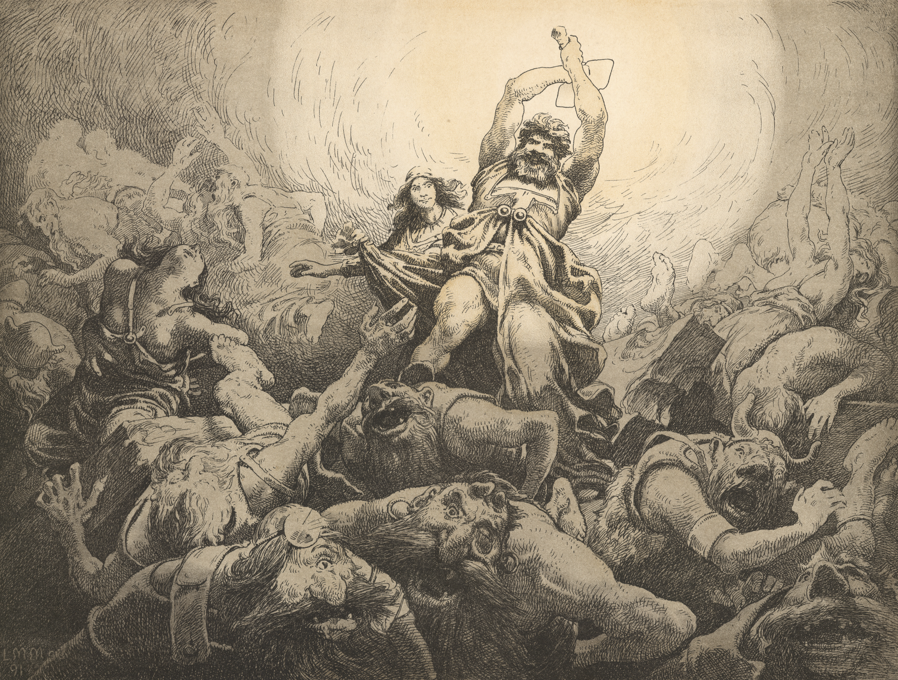 V: Tor hos Trym. Farvelitografi på papir opklæbet på pap. Nederst: Sign. L. M. Moe, 91. Danmarks Historie i Billeder V. Tor hos Trym. Alfred Jacobsens litogr. Etablissement, København K. Samlingen omfatter 50 billeder, mus.nr. 17.001-17.049. Nr. VI og L mangler. Samlingen er udgivet i 1898, se V.E. Clausen: Folkelig grafik i Skandinavien, 1973 s. 144. 70.9 Cl f. Udstillet i juli-august 1906 iflg. årsberetning 1906-07. 1 dublet, er modtaget fra N. Zahles Gymnasieskole i november 1979 tillige med 2 prøvetryk af billederne fra Lærerstandens Adresseavis, 2. juni 1892, med foromtale af billederne.